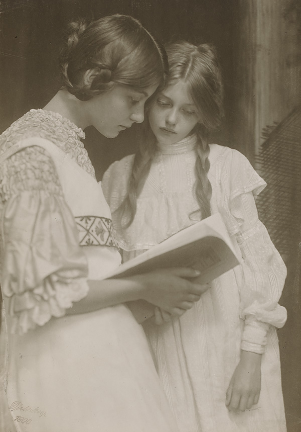 Gertrude und Ursula Falke. 21 × 15 cm, Platinatrykk. NMFF.000493